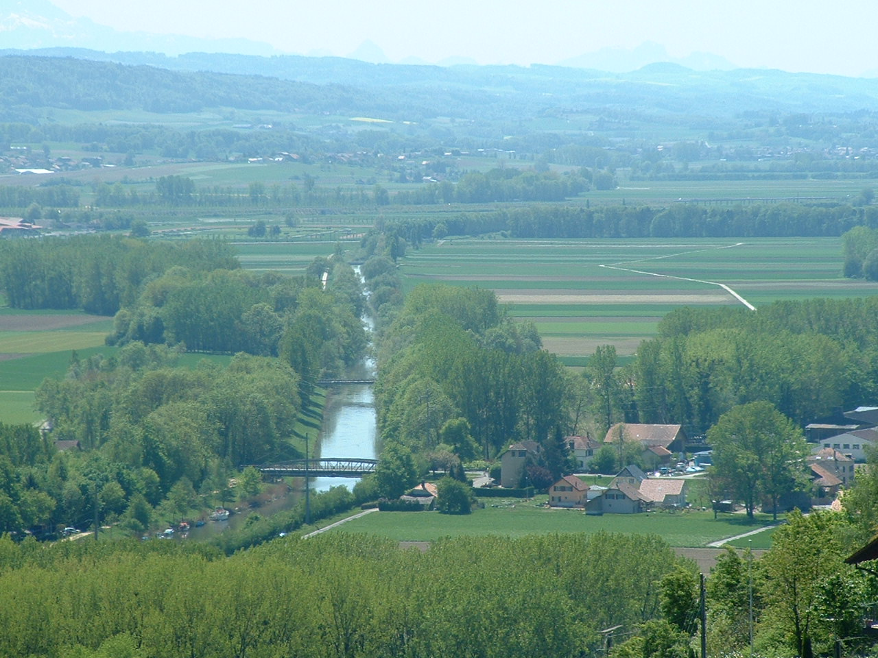 Plaine de la Broye, juste avant l'embouchure de celle-ci à Salavaux (sur la gauche).